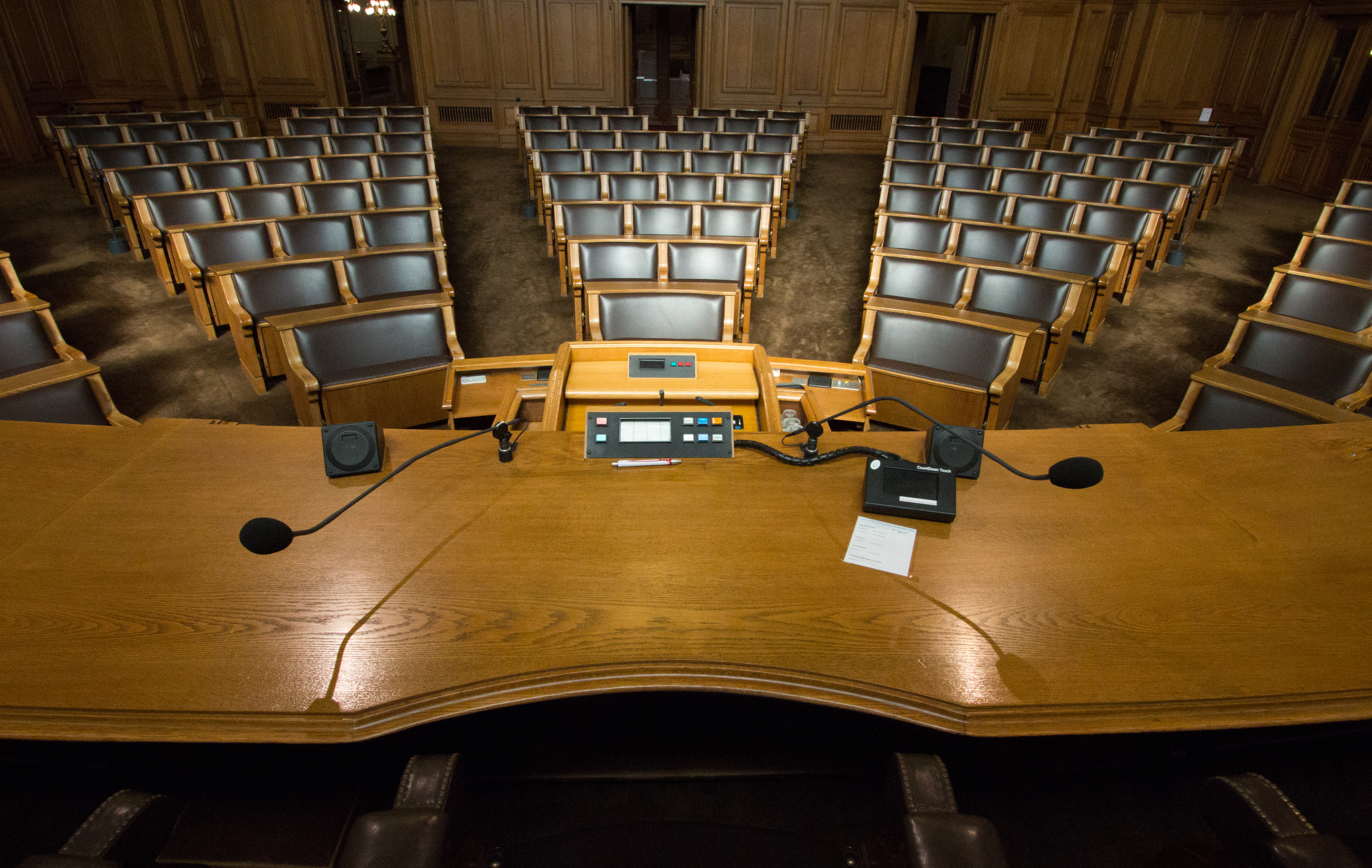 Plenarsaal der Hamburger Bürgerschaft: Blick der Präsidentin in den Plenarsaal